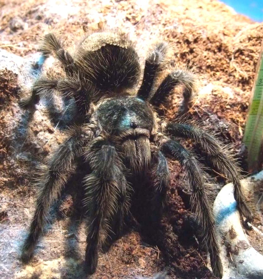 Grammostola grossa